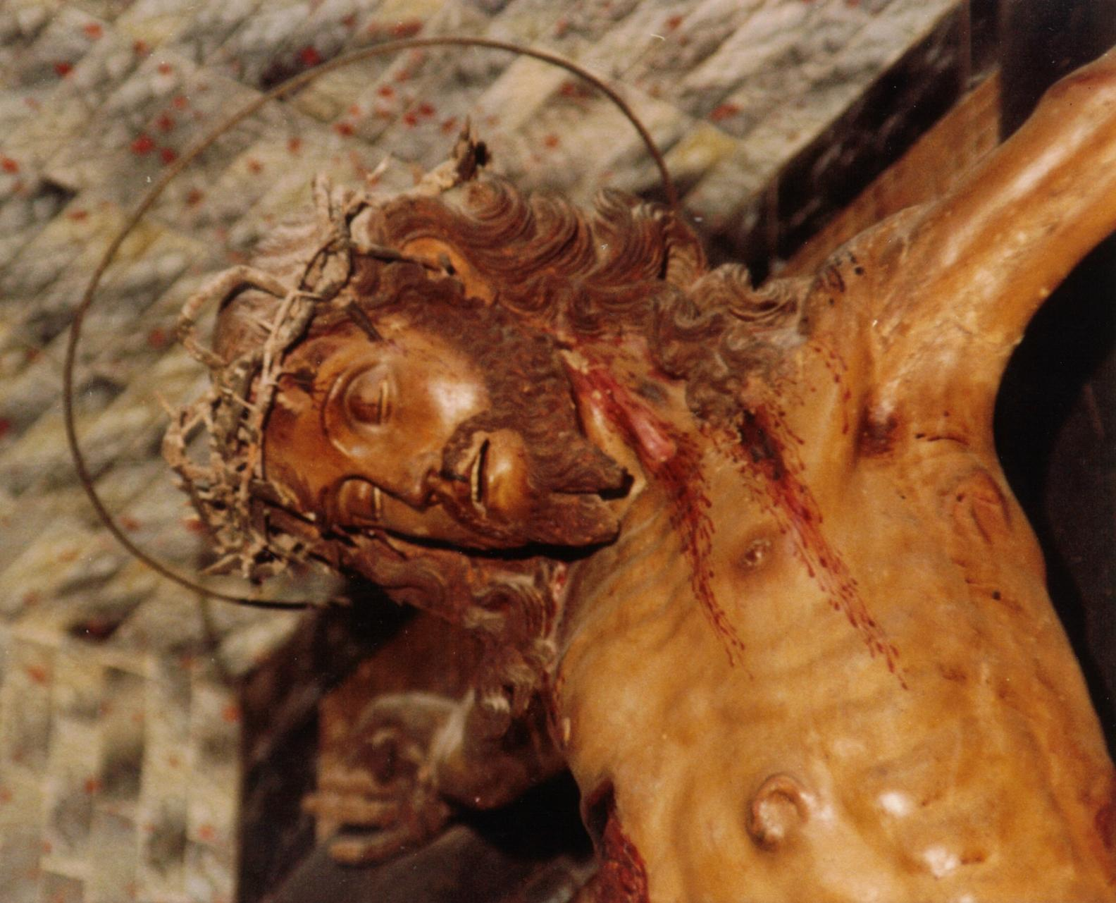 Aidone EN_Sicilia: particolare del Cristo di Frate Umile da Petralia nella chiesa di sant'Anna